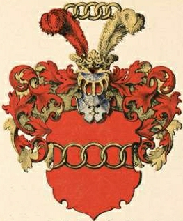 Budbergi suguvõsa aadlivapp ja Bönningshausen gen. Budbergi suguvõsa parunivapp